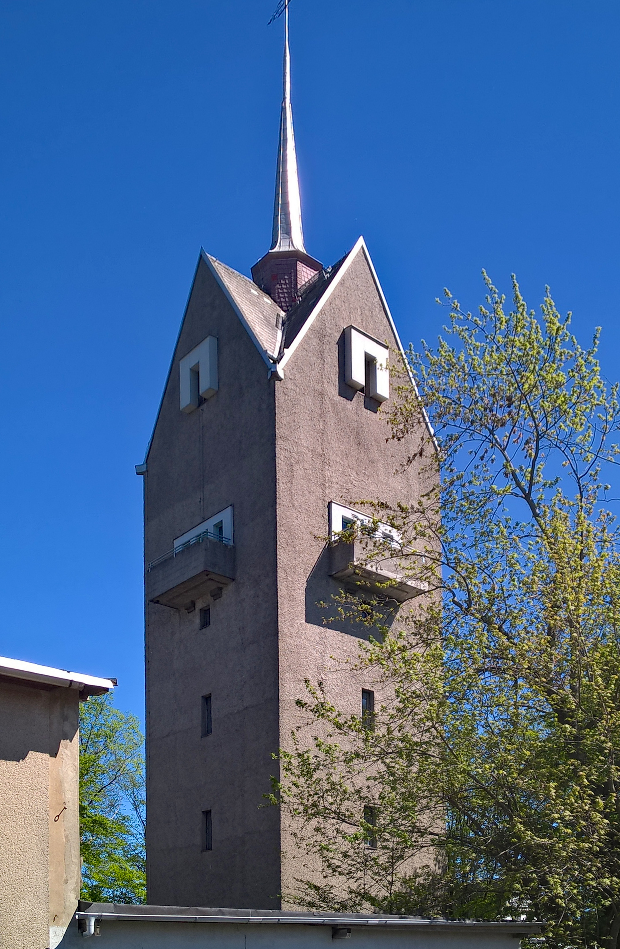 Wasserturm, Hofeweg in Glauchau OT Gesau